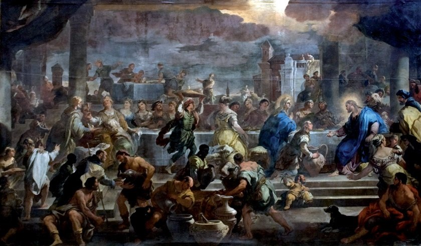 Luca Giordano, Nozze di Cana (1705) - Chiesa Donnaregina Nuova di Napoli